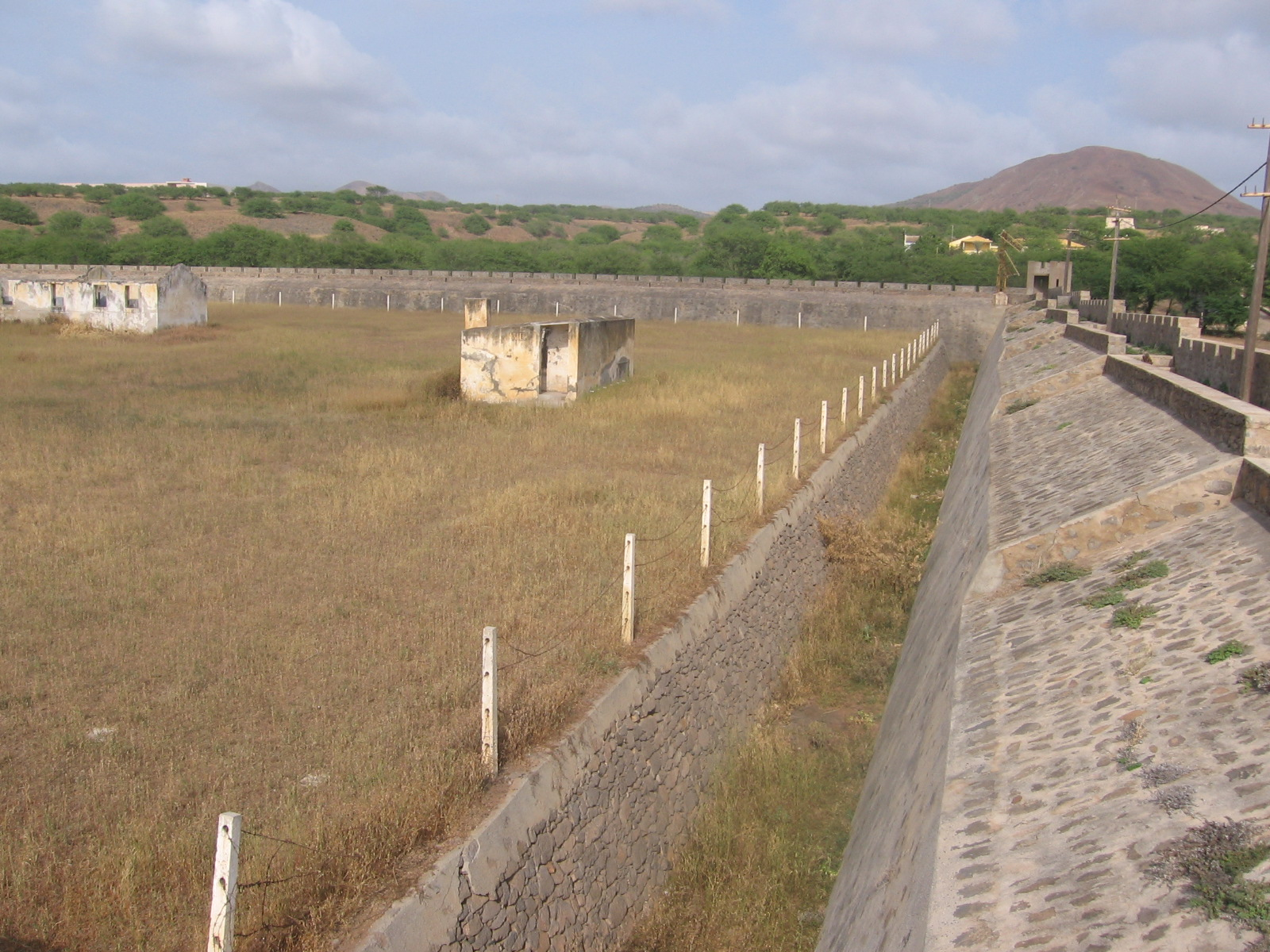 Campo de Concentração do Tarrafal, muro de vedação, ilha de Santiago, Cabo Verde